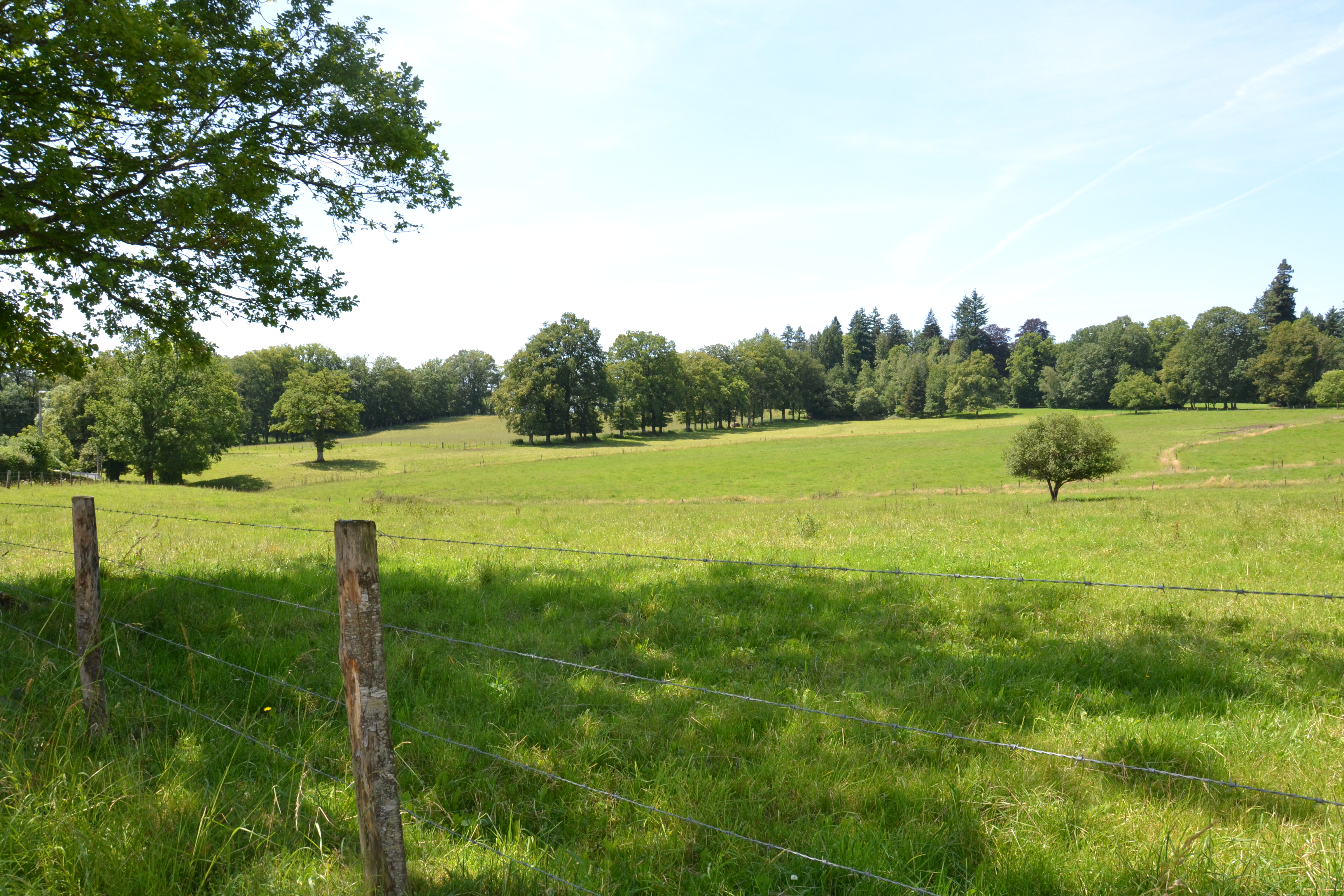 Un paysage de semi-bocage en Limousin (ici près de Landouge, commune de Limoges, Haute-Vienne), appelé dans cette région "campagne-parc".